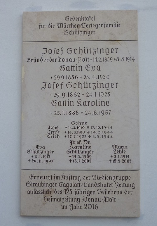 Gedenktafel Josef Schützinger Zeitungsgründer Donau-Post Wörth an der Donau